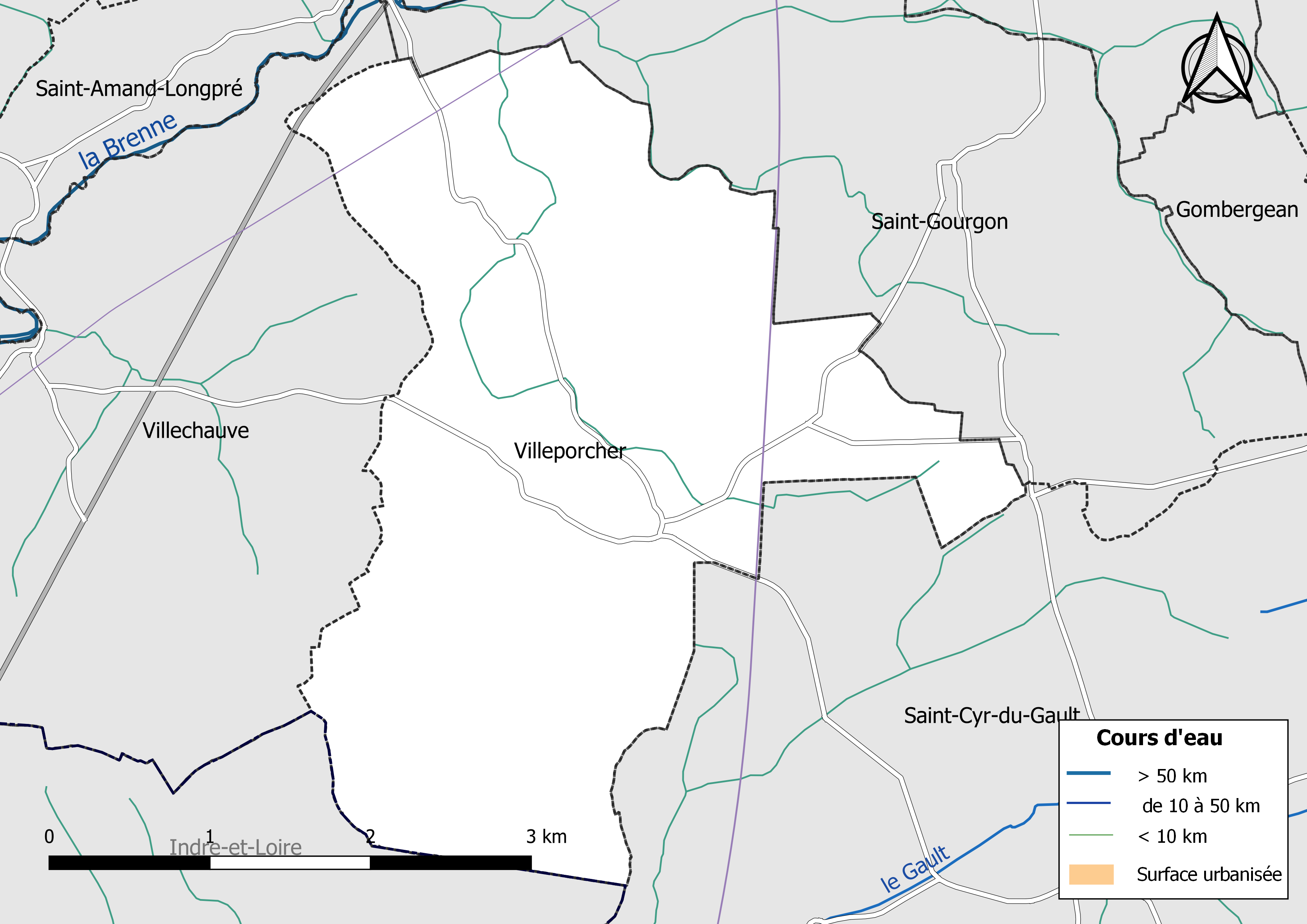 Carte du réseau hydrographique de la commune de Villeporcher (Loir-et-Cher, France).